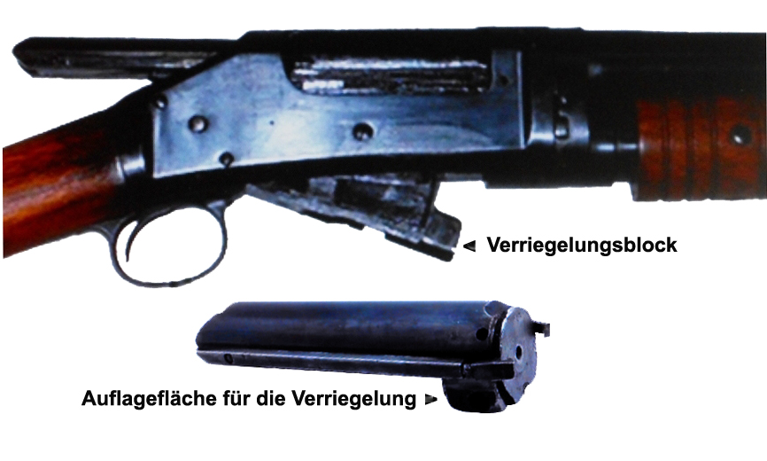 Winch M1897 Verriegelung